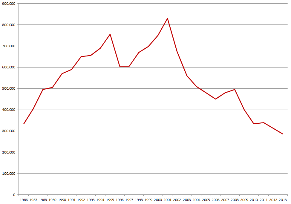 Entwicklung der Besucherzahlen auf der CEBIT